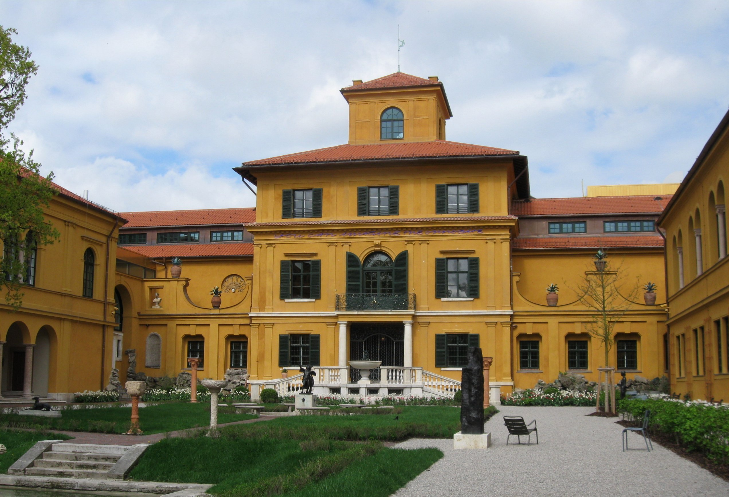 Lenbachhaus, München, kurz vor der Wiedereröffnung